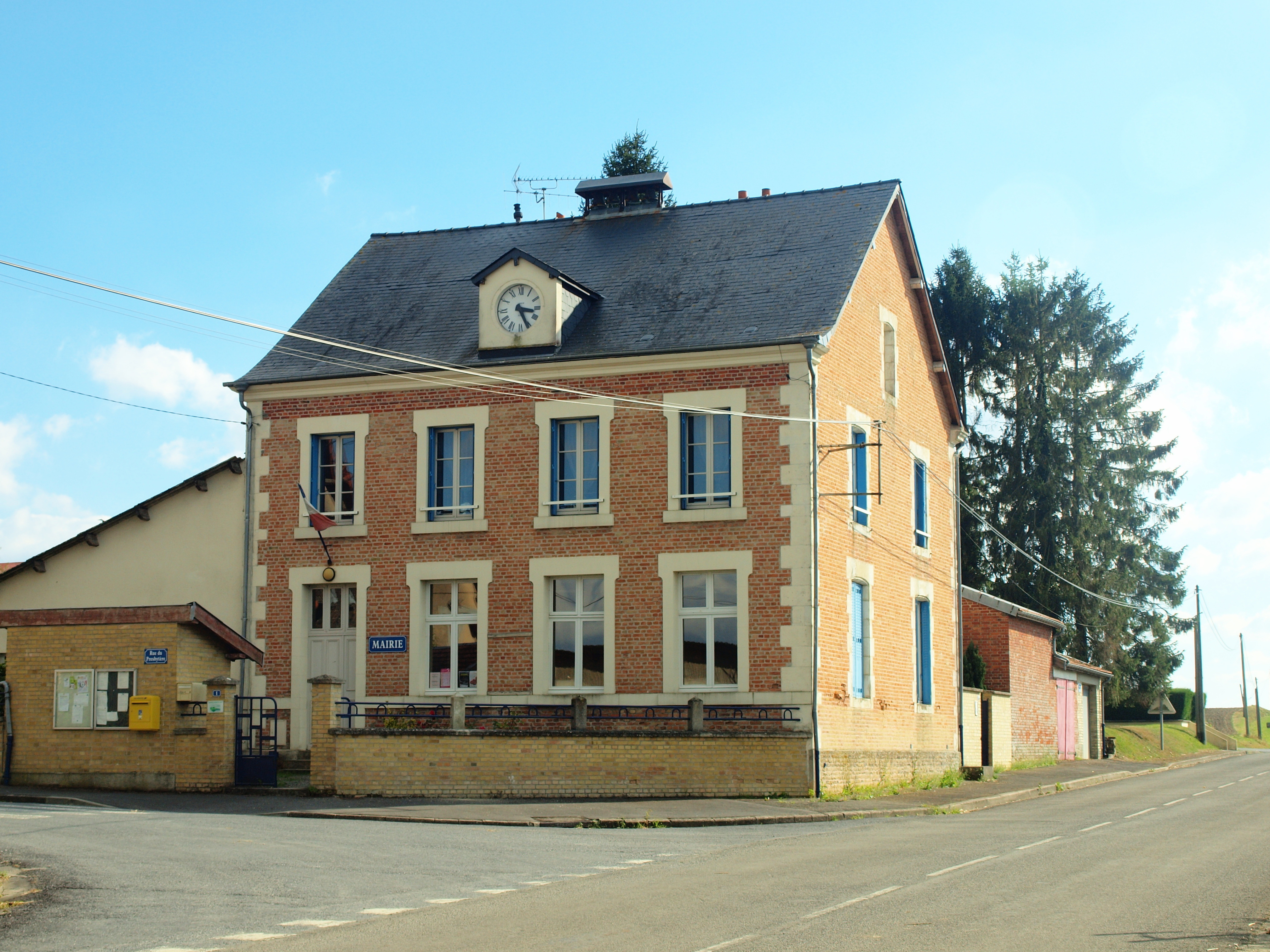 Sainte-Vaubourg (Ardennes, France)